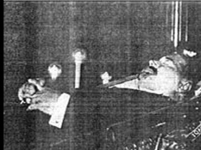 Stjepan Radić na posmrtnome odru.